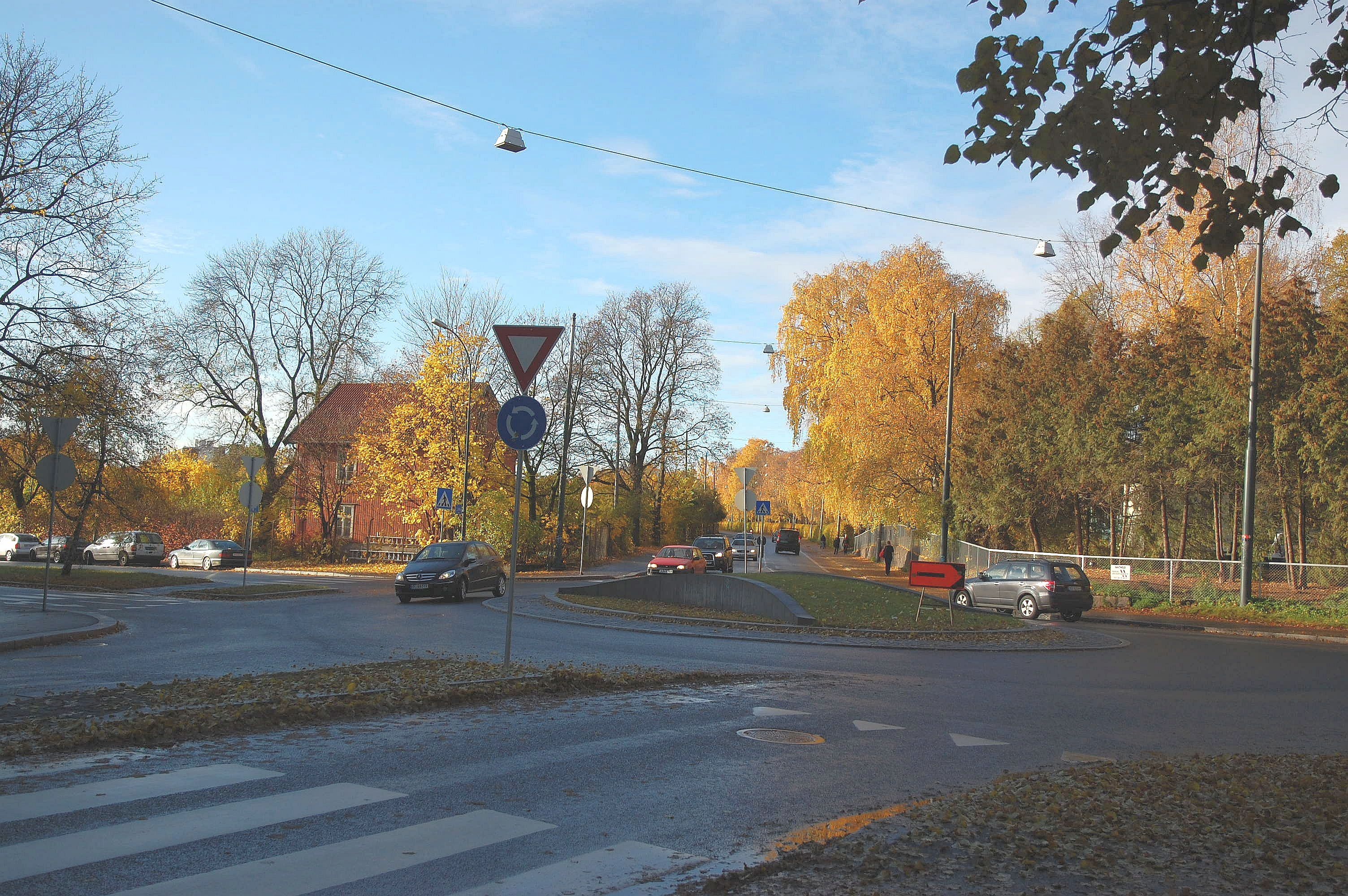 Kierschows gate sett fra Gråbeinsletta. Sagene i Oslo